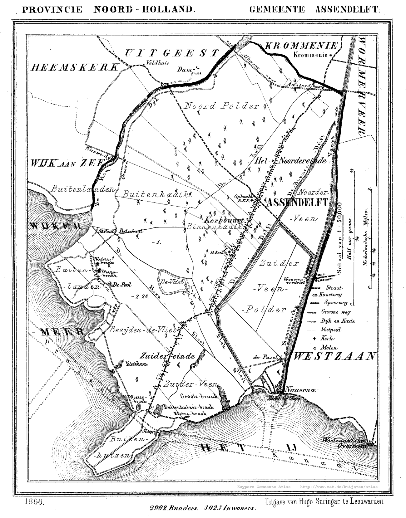 Kaart van Assendelft uit Gemeente Atlas van Nederland, J. Kuyper 1865-1870, Uitgave Hugo Suringar Leeuwarden.